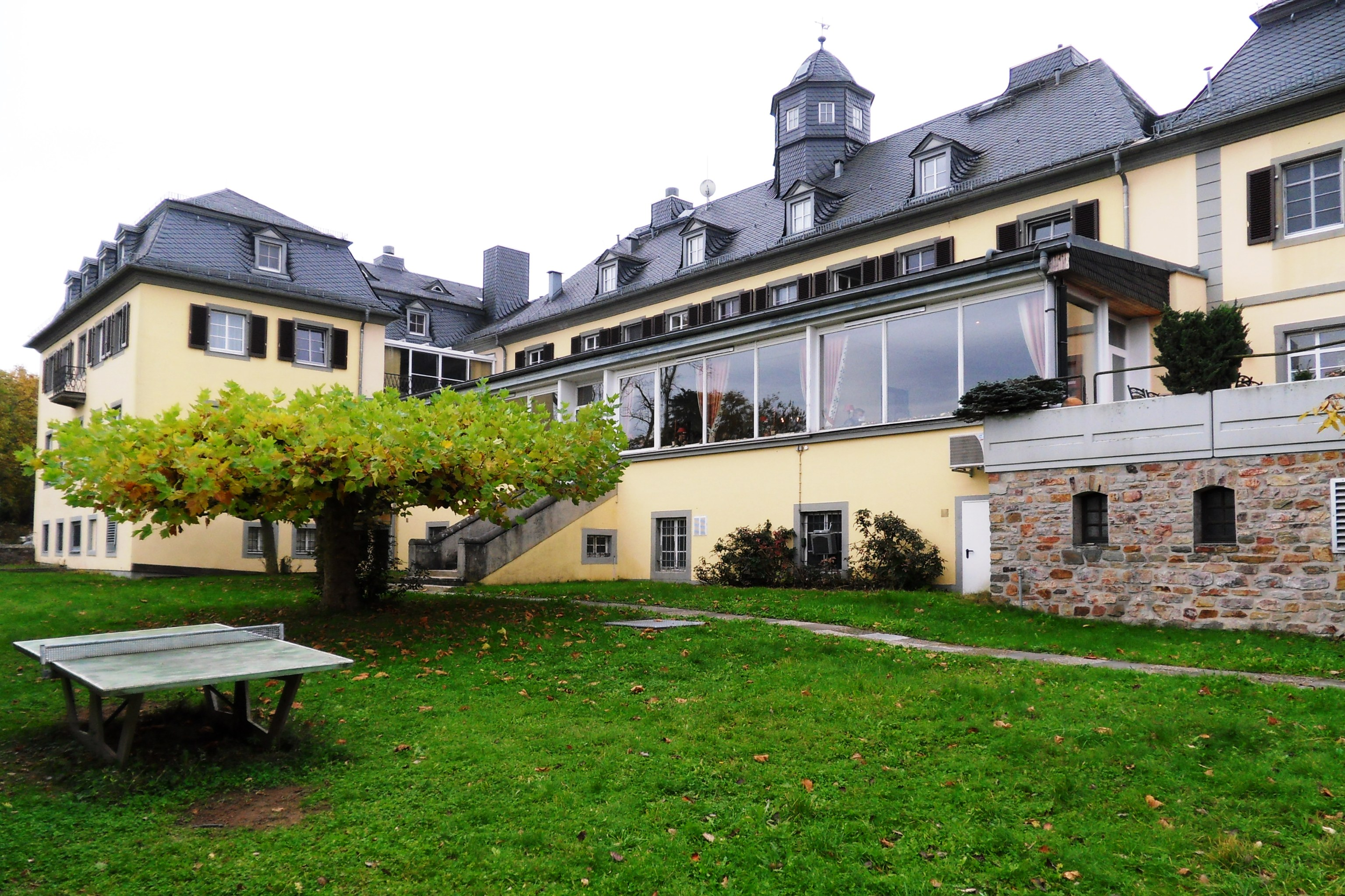 Nordseite von Hotel Jagdschloss Niederwald im Landschaftspark Niederwald bei Rüdesheim